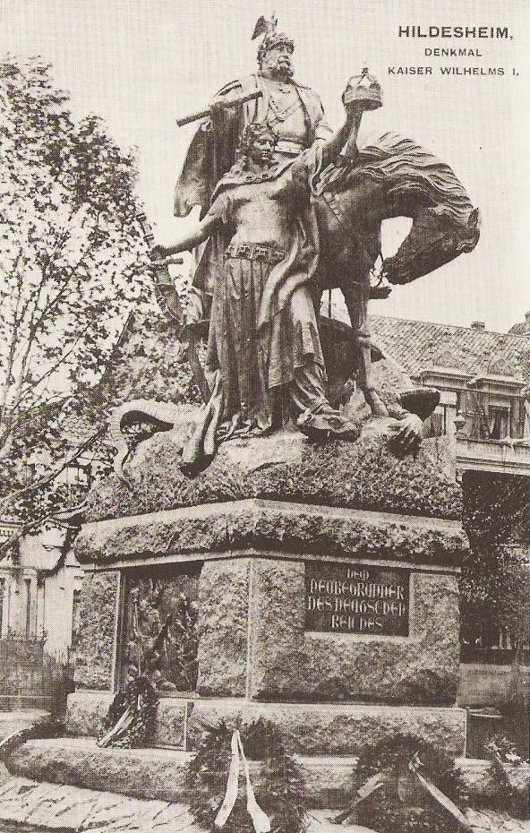 ehemaliges Kaiser-Wilhelm-Denkmal in Hildesheim